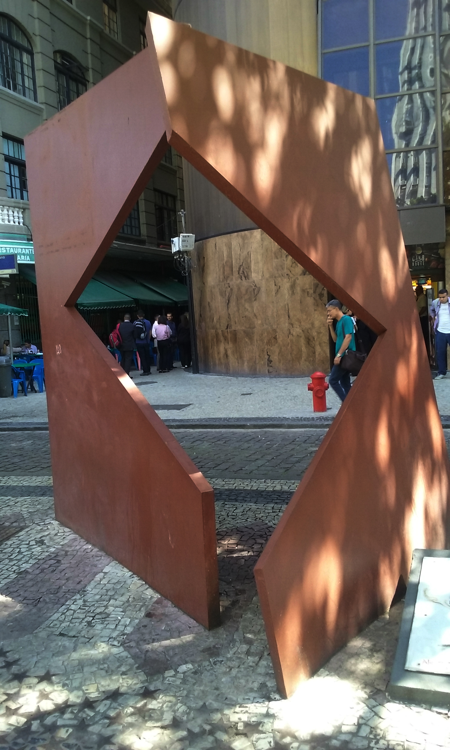 Monumento ao Nunca Mais, da escultora Cristina Pozzobon, instalado na Cinelândia, no Centro do Rio de Janeiro, em homenagem às vítimas da ditadura militar no Brasil